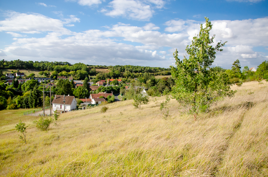 Vue du village d'Abbéville la rivière